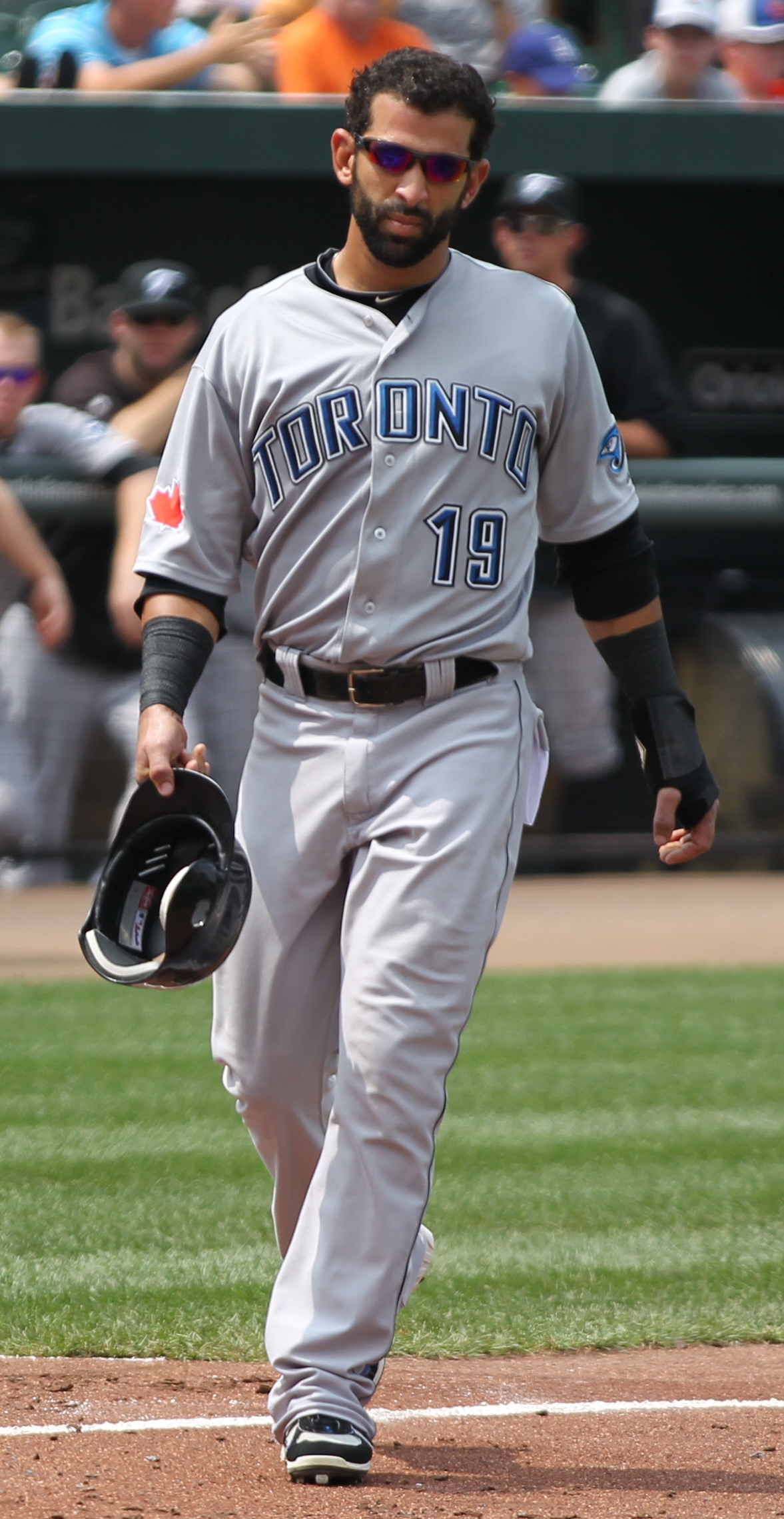 José Bautista